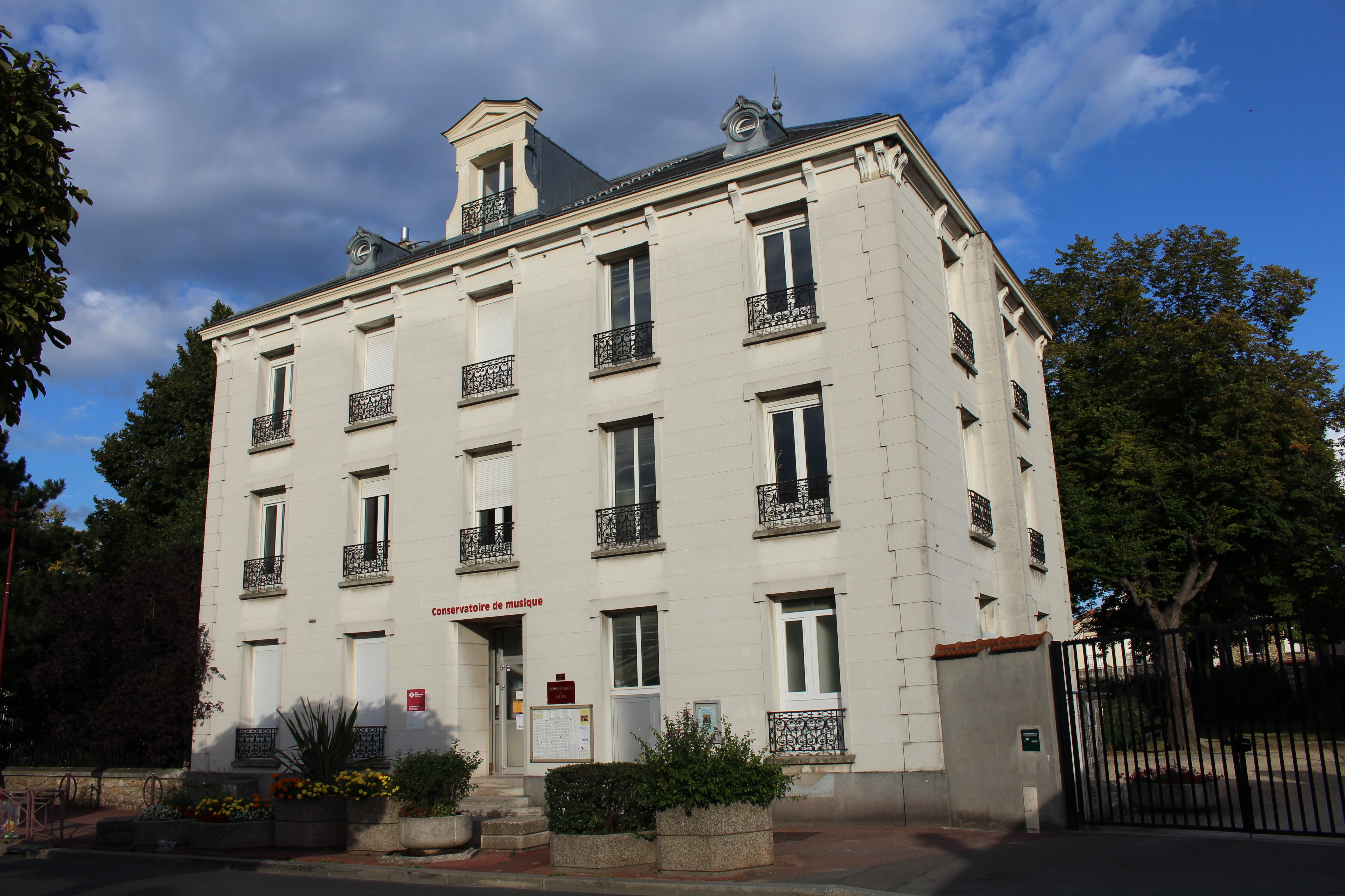 Conservatoire de musique de Bondy.